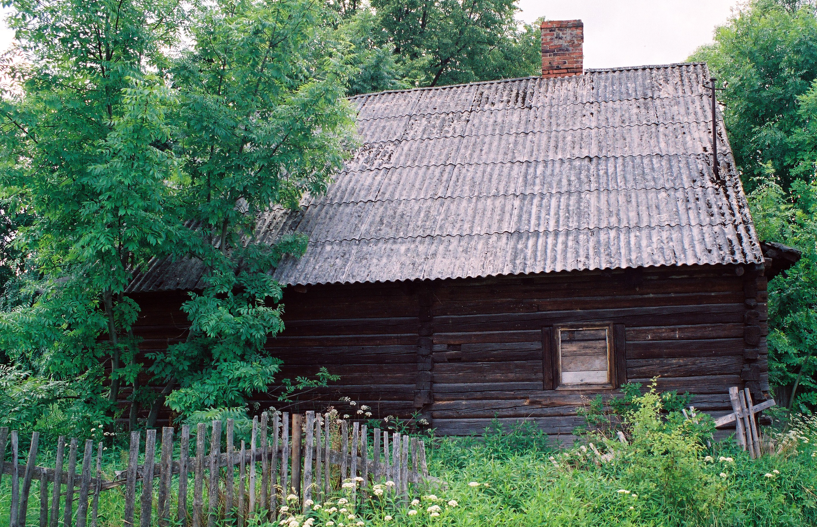 Drewniana chata w Hucisku, gmina Boronów, powiat lubliniecki, województwo śląskie